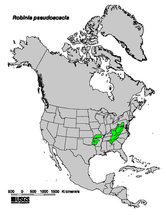 Range map of Robinia pseudoacacia